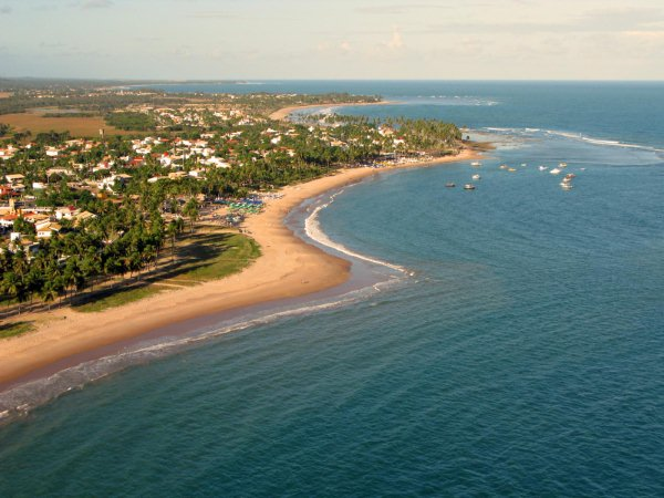 Foto aérea da praia de Guarajuba Foto: Léia Figueiredo de Oliveira